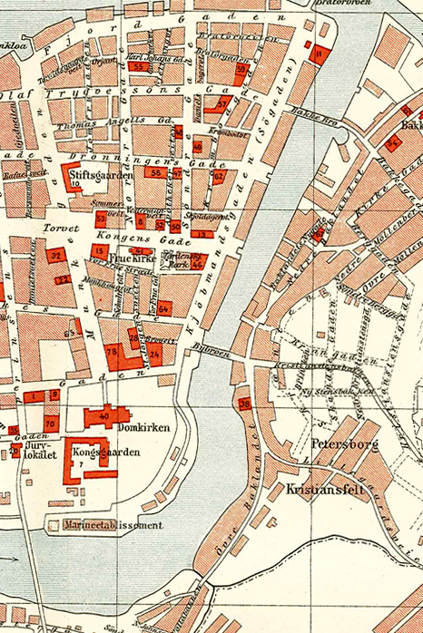 Kart over Bakklandet, Trondheim, 1898.